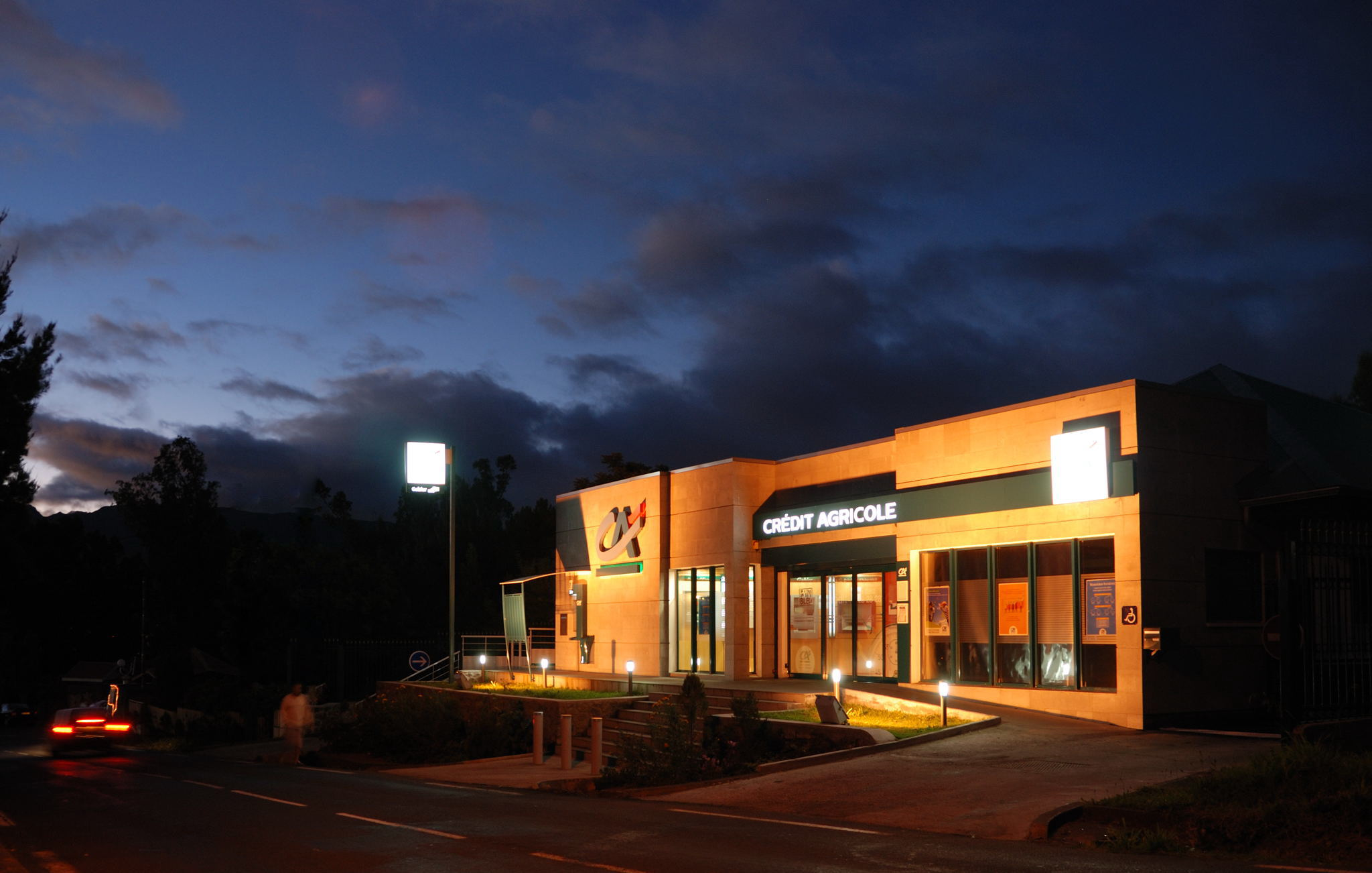 Crédit Agricole du 23ème kilomètre au Tampon, sur l'île de La Réunion.